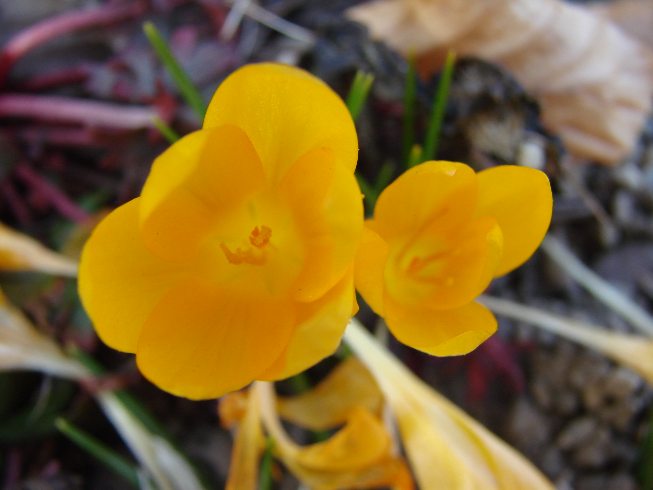 Jardin botanique de l'Université de Zurich (Suisse) : Crocus ancyrensis G. Maw